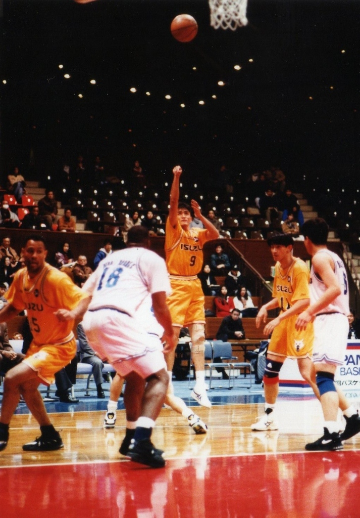 見事なシュート